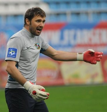 Віталій Рева — український футболіст під час виступів за ФК Арсенал Київ